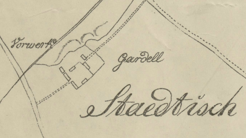 Das Vorwerk Gardell bei Gleiwitz im Jahr 1812. Zeichnung von 1911 nach alten Karten.